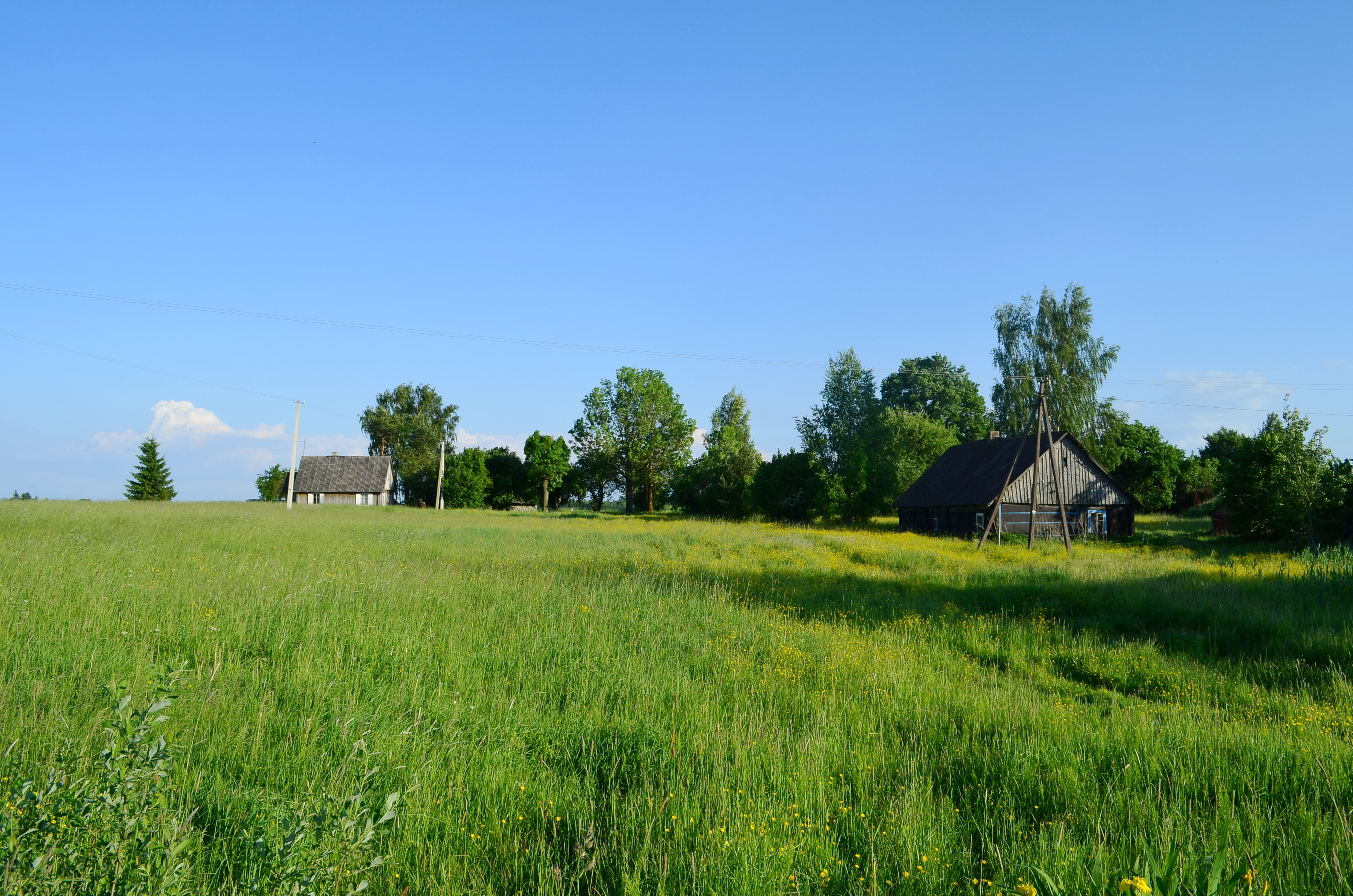 Voskaičiai, Kėdainių raj.